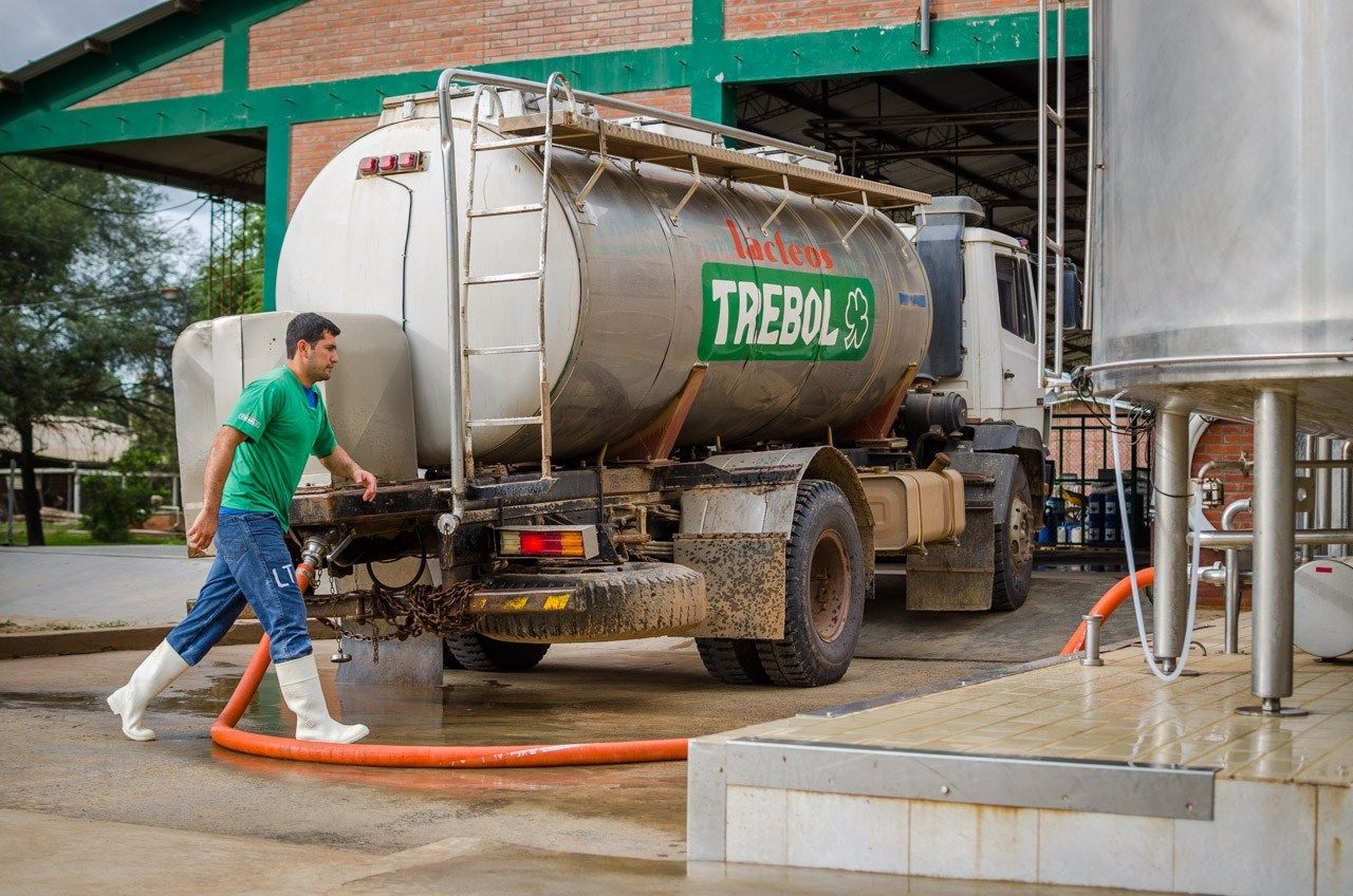 En el centro de Lolita, en la fábrica de quesos Trébol, un funcionario conecta la manguera para extraer la leche del camión y cargarla al tanque. La leche proviene de las granjas de los menonitas ubicadas a lo largo de la región. De sus productos se hacen todo tipo de quesos en esta fábrica para el abastecimiento de todo el país.